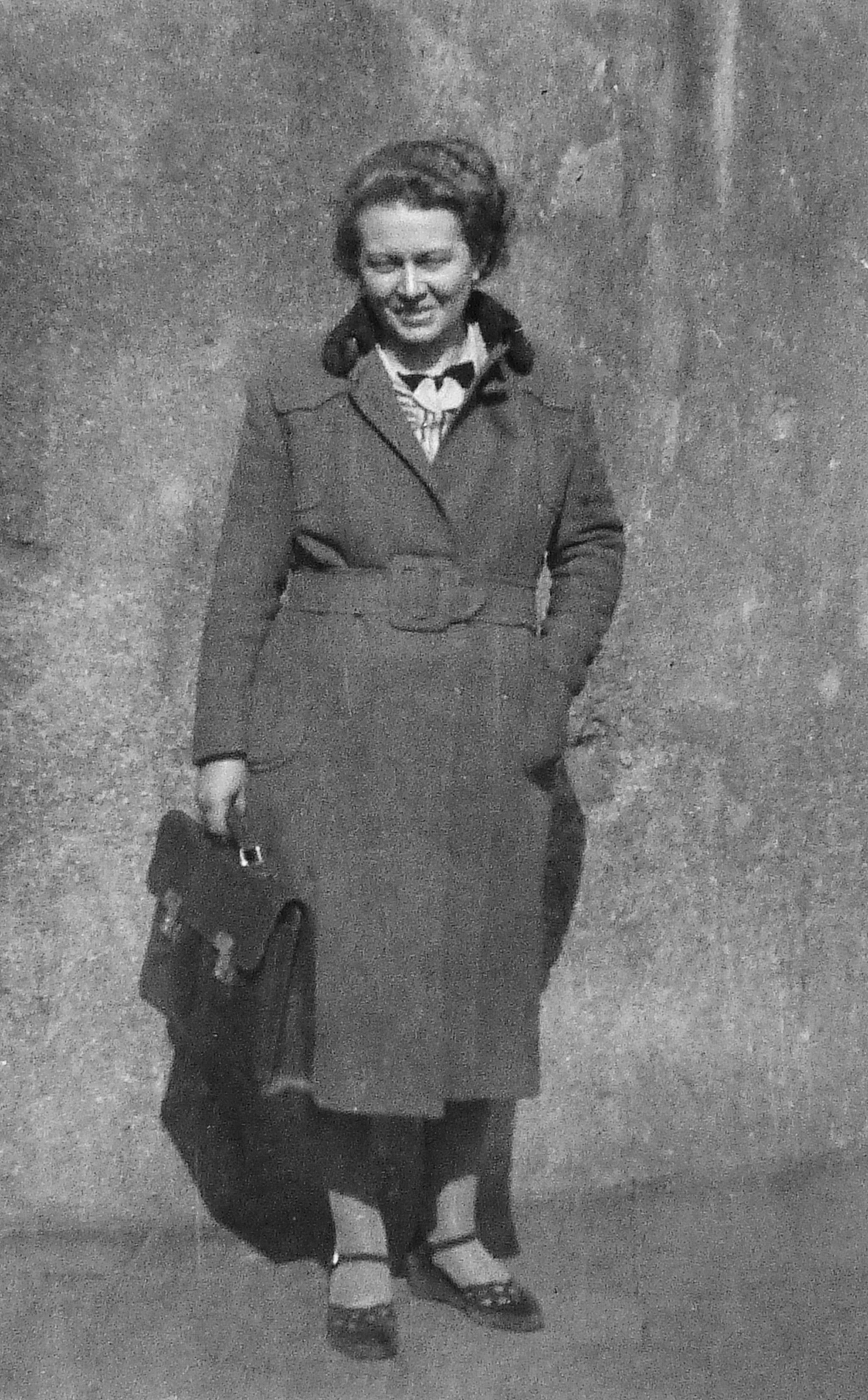 Die Nürnberger Grundschullehrerin und Autorin Elisabeth Fürst, fotografiert 1953 von mir selbst mit meiner ersten Kamera, einer Boy Box, vor dem Schulhaus; dieses Foto wurde später von mir abfotografiert und digital verbessert